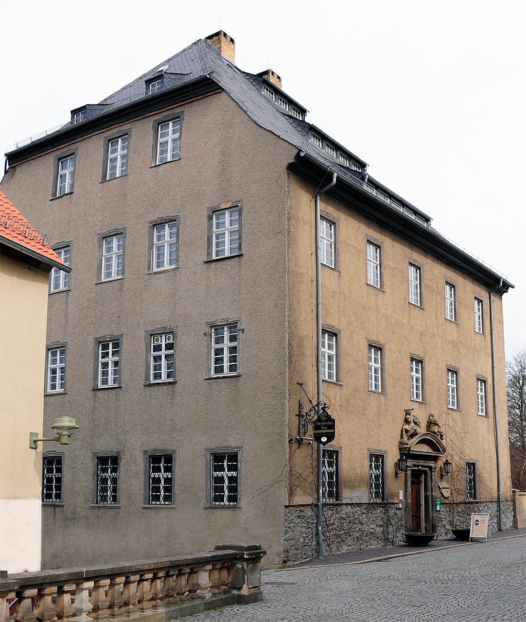 Naturkundemuseum im Schreiberschen Haus, Gera 2009